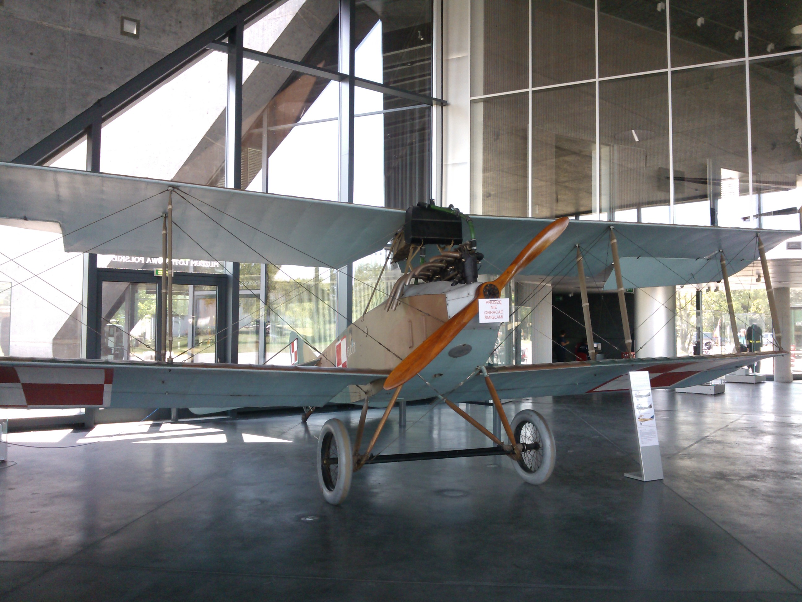 Niemiecki samolot szkolny z 1919 roku (numer 10019) eksponowany w Muzeum Lotnictwa Polskiego w Krakowie